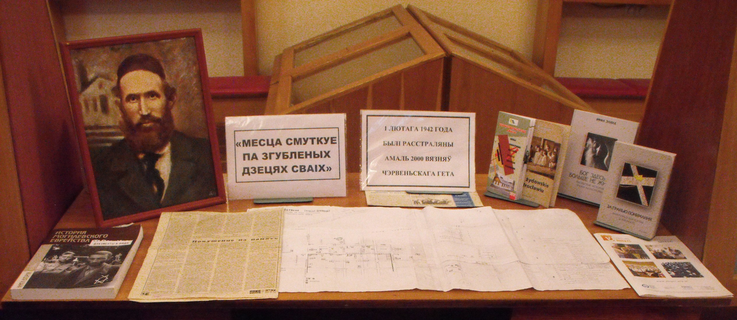 Часть экспозиции Червенского краеведческого музея, посвященная местному гетто. Слева - портрет кузнеца Боруха Гельфанда, который во время переселения евреев в гетто вышвырнул полицаев из дома. За это его связали и забивали в голову гвозди, пока он не умер.